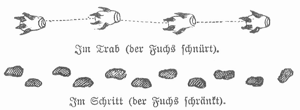 Spur des Fuchses